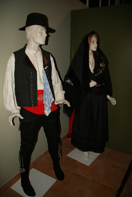 traje tipico serradillano